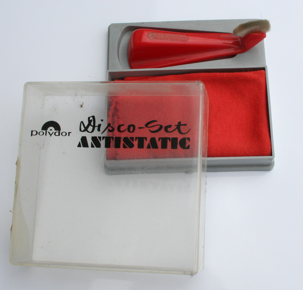 Antistatik-Set